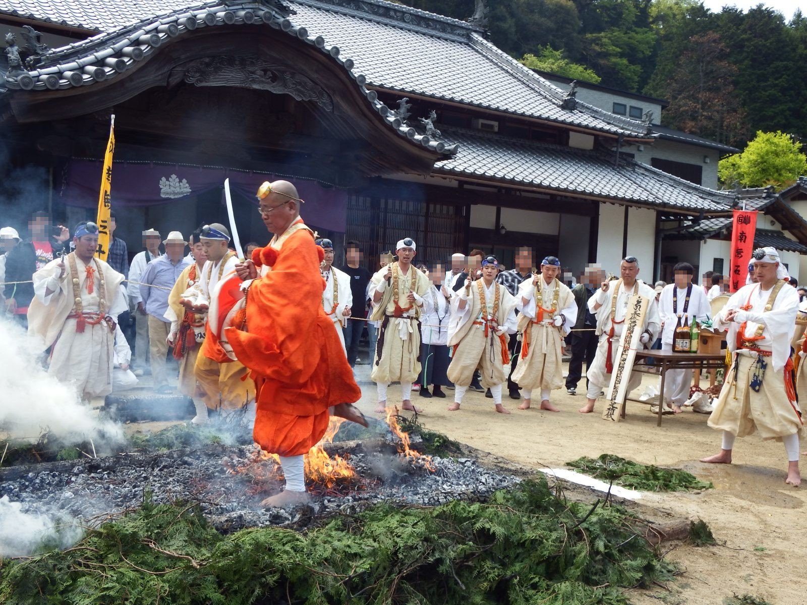 石鎚山極楽寺